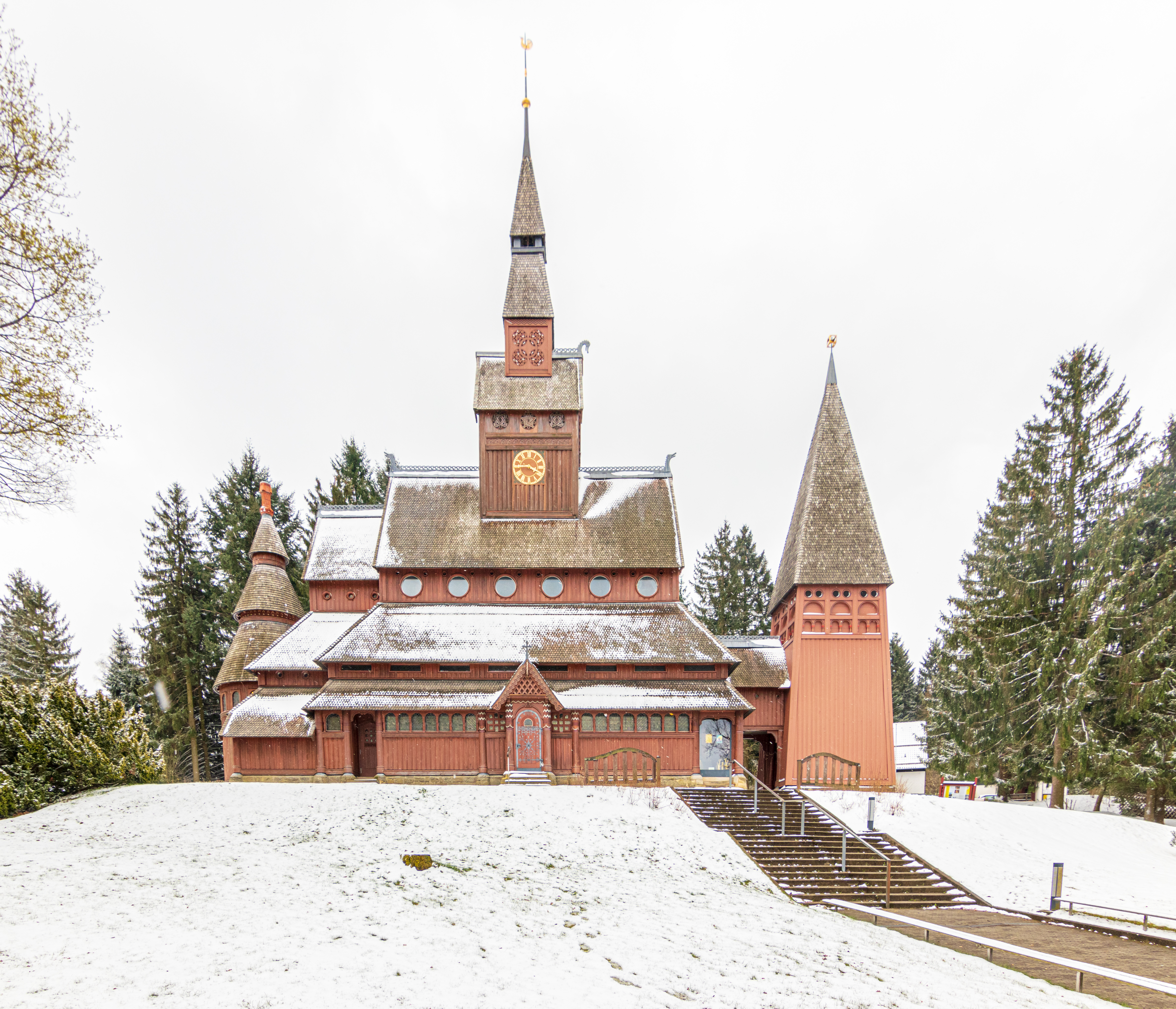 Die Gustav-Adolf-Stabkirche ist eine Stabkirche im Goslarer Stadtteil Hahnenklee-Bockswiese im Harz.